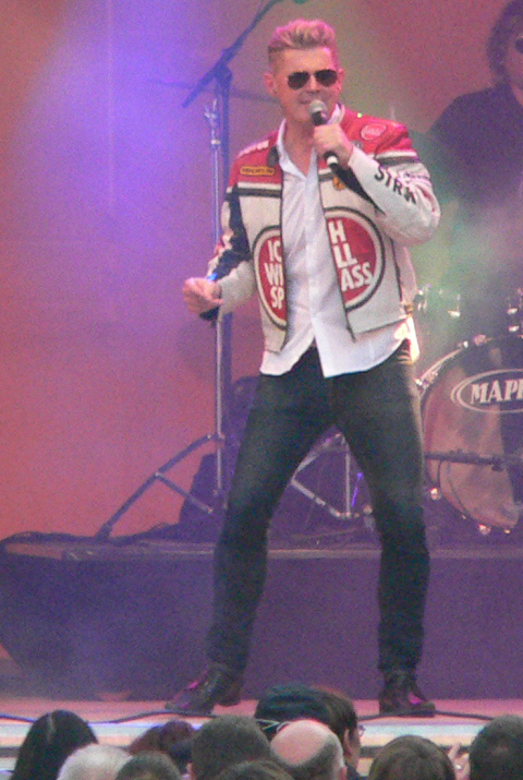 Markus